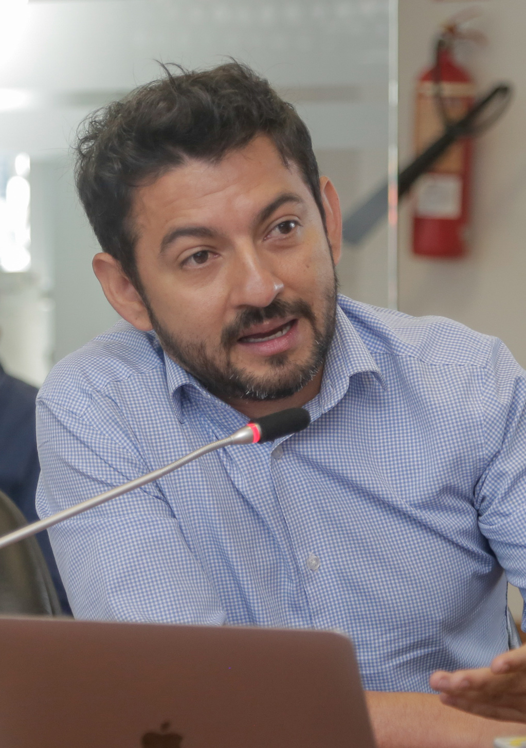 Millán Ludeña, deportista extremo, en 2017